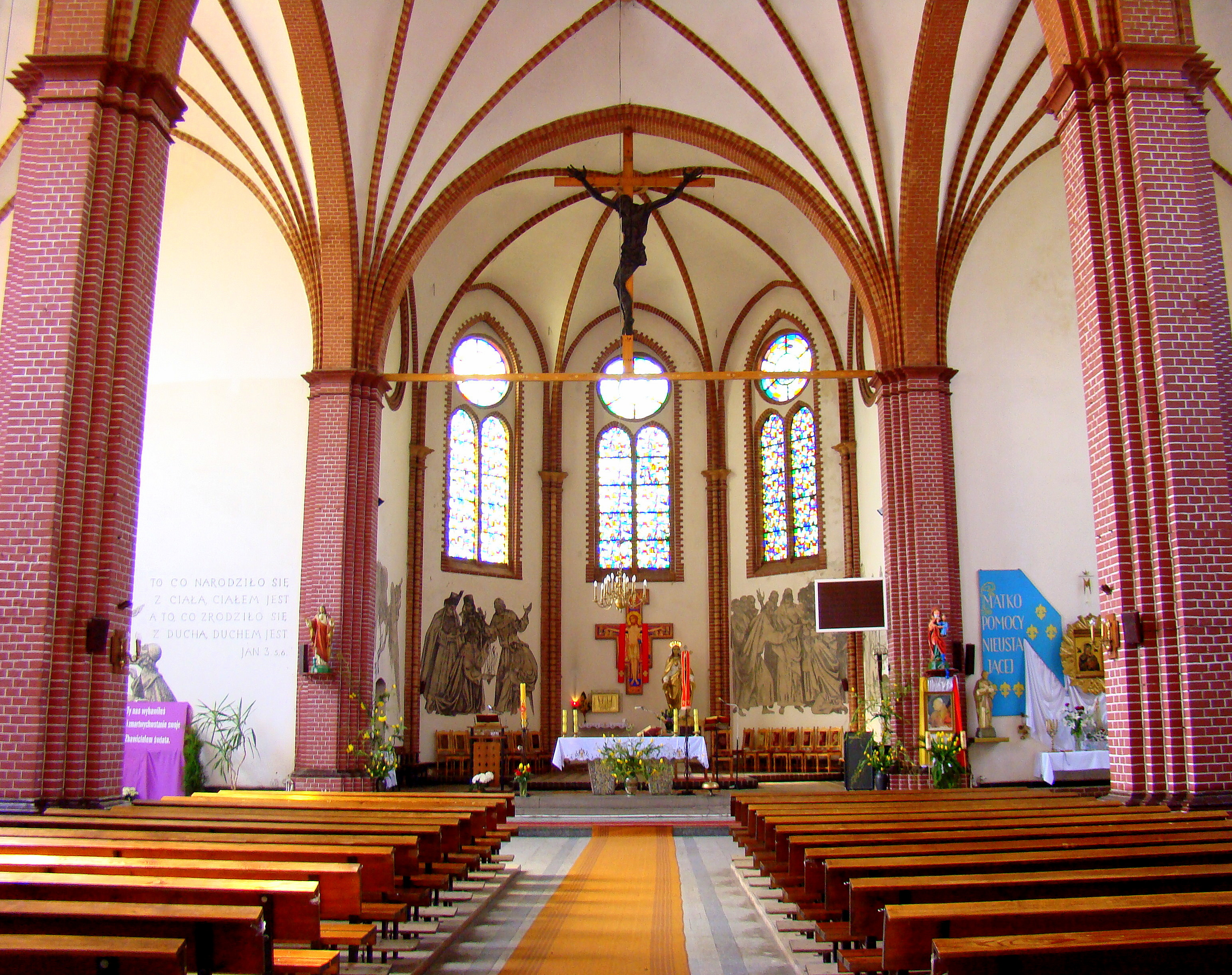 Kościół Niepokalanego Poczęcia NMP w Policach (wnętrze), Polska